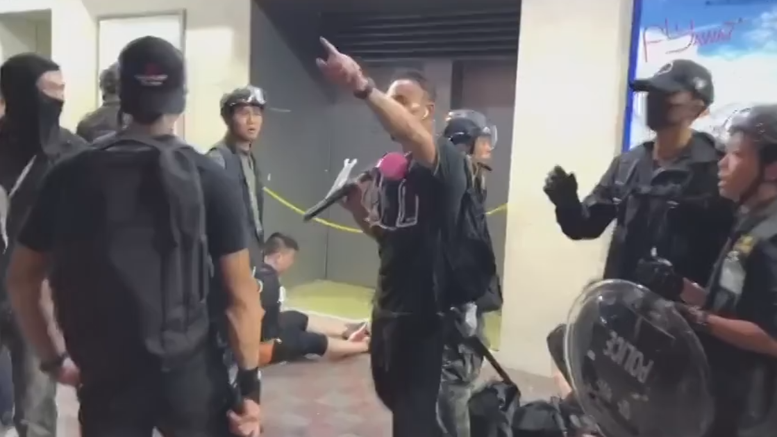 香港警務人員打扮成示威者混入示威群眾